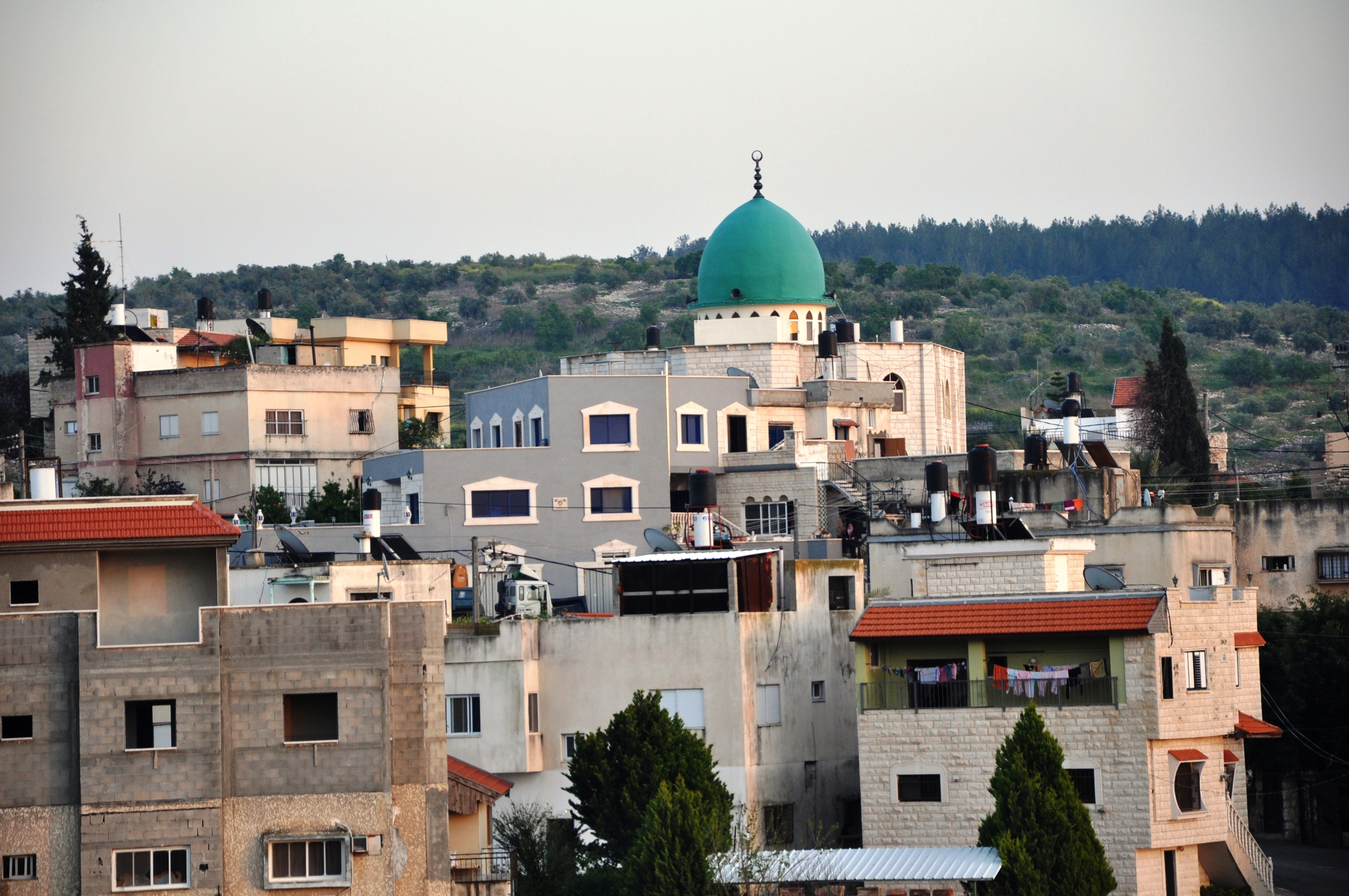 כפר מועאויה